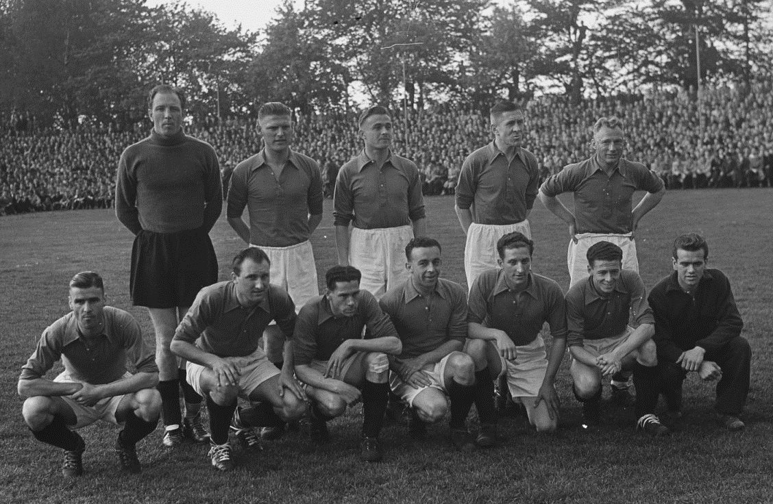 PSV elftal.